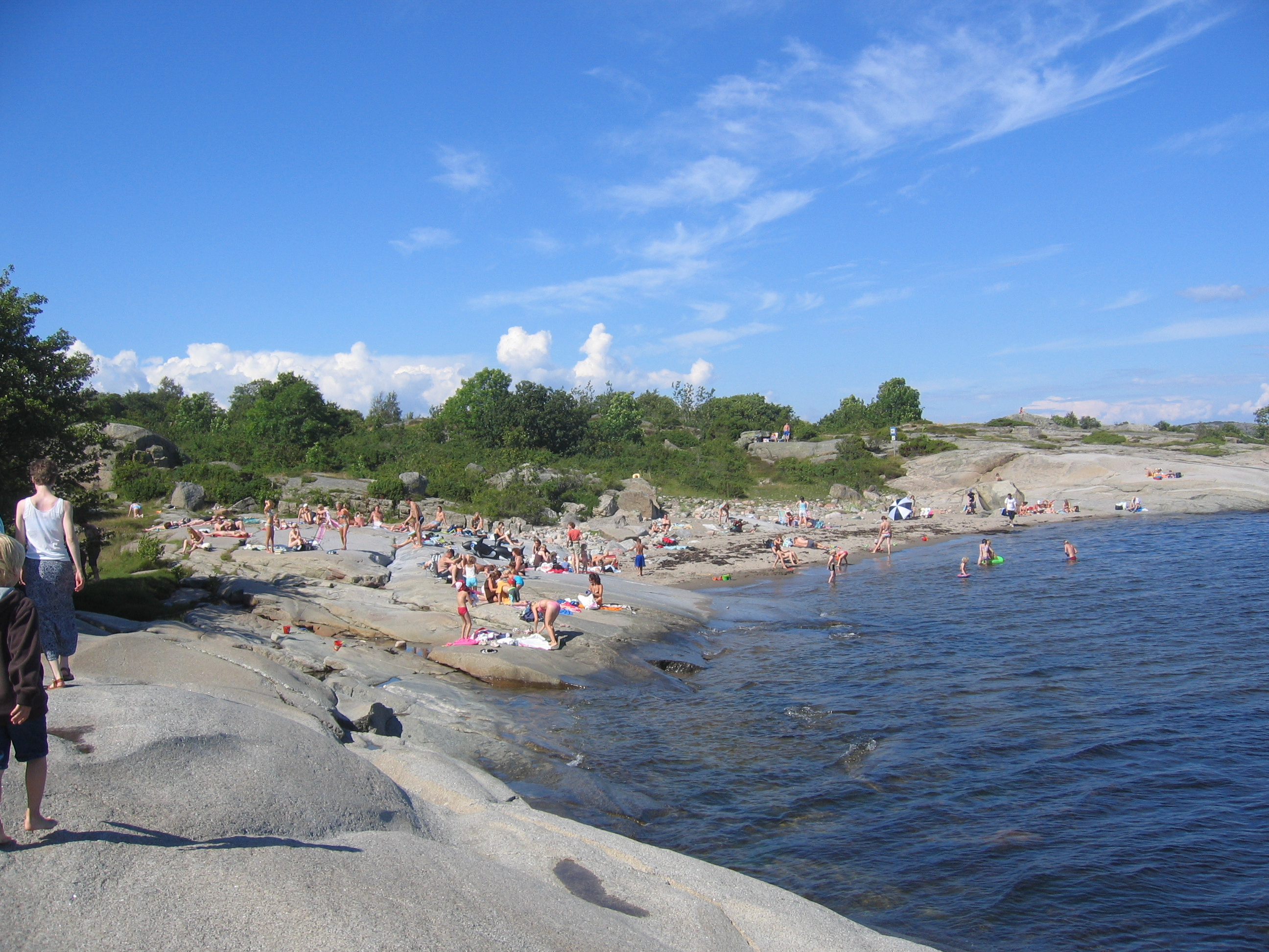 Beach at Lilleskagen, Tjøme